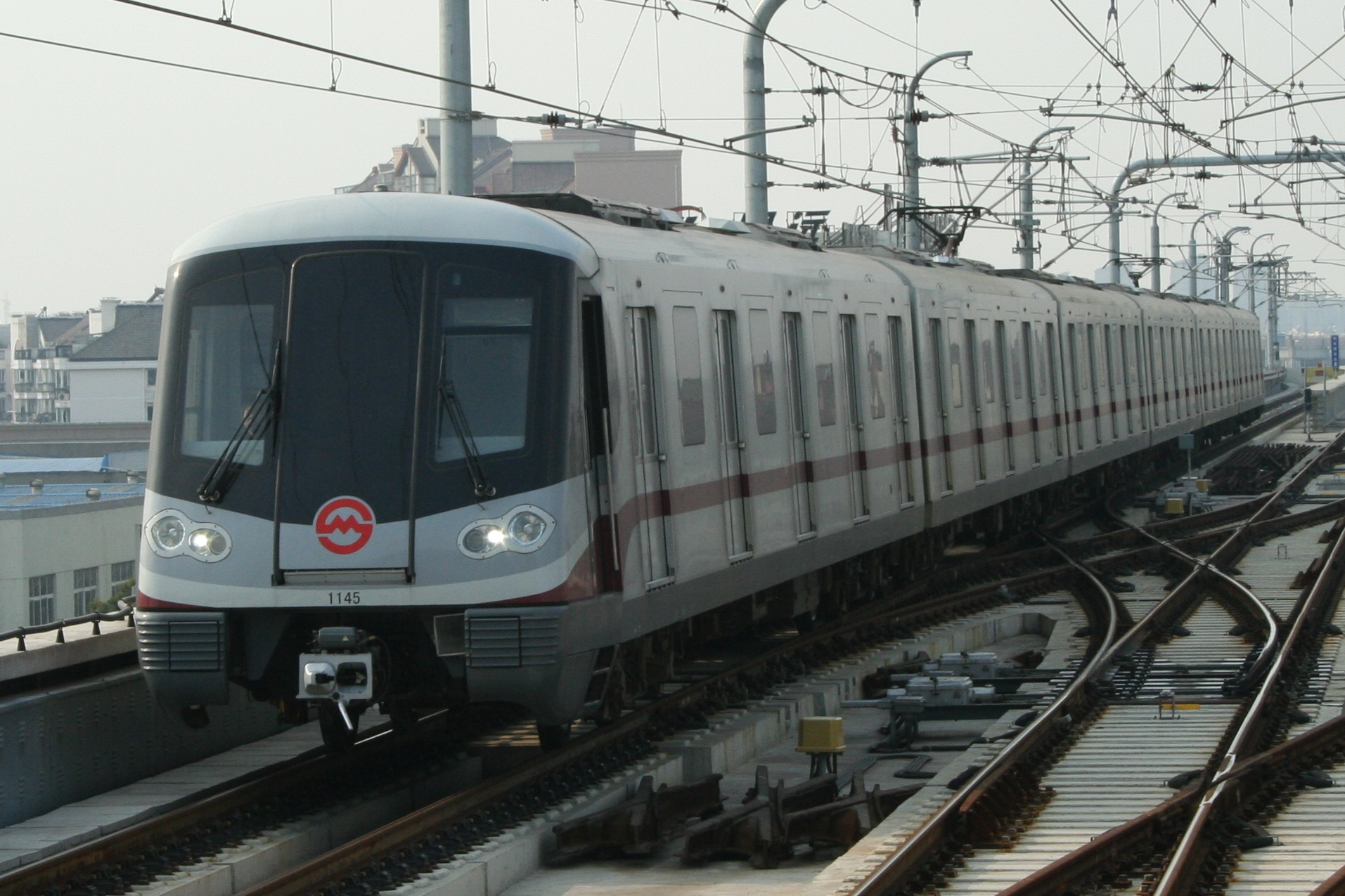 上海地鉄11号線 花橋にて